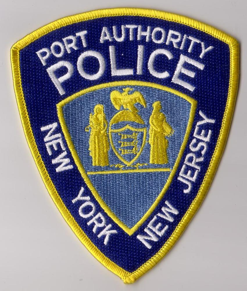 USA - new york & new jersey - port authority police